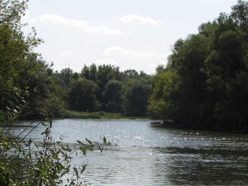 Seversky Donets near Shipilivka, Ukraine